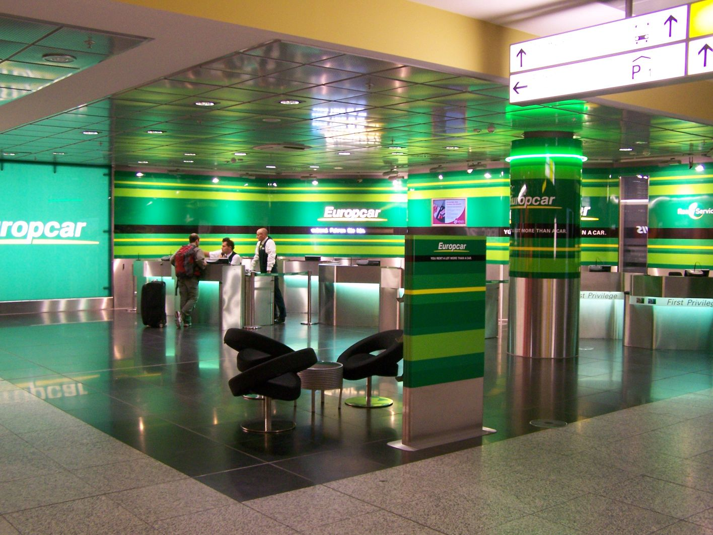 Europcar am Hannover Airport